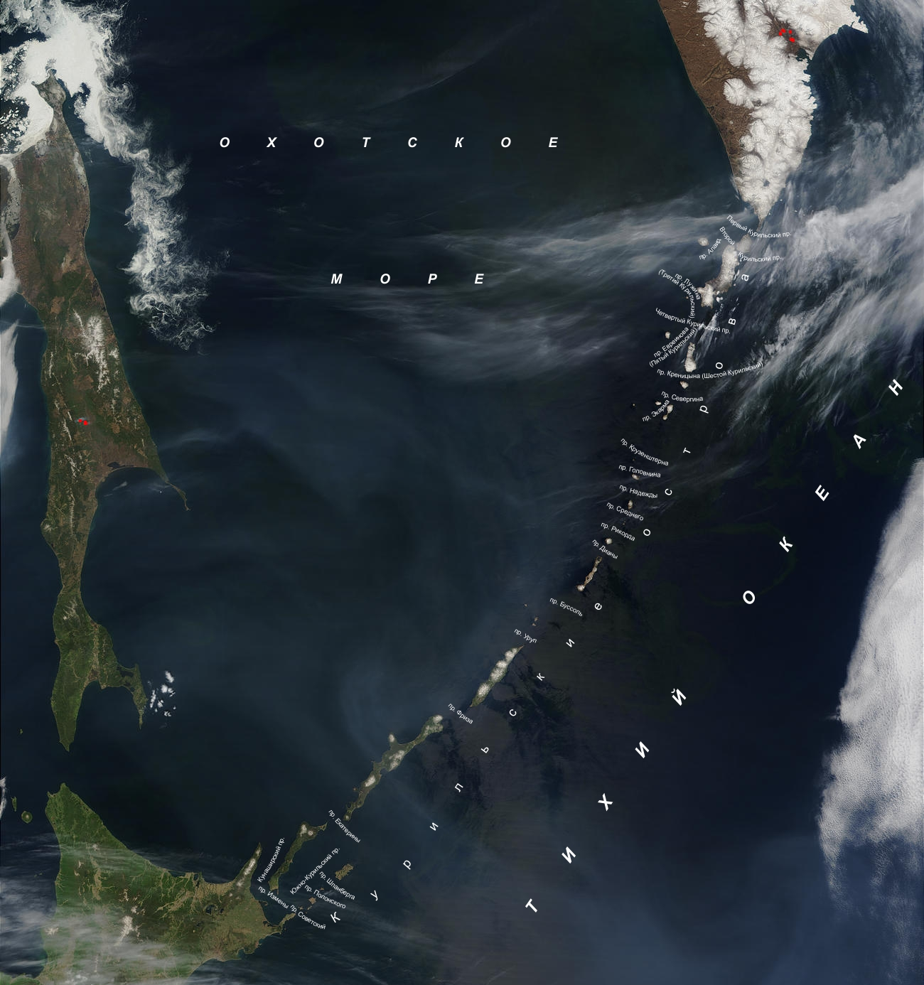 Фотокарта курильских проливов на основе космического снимка НАСА